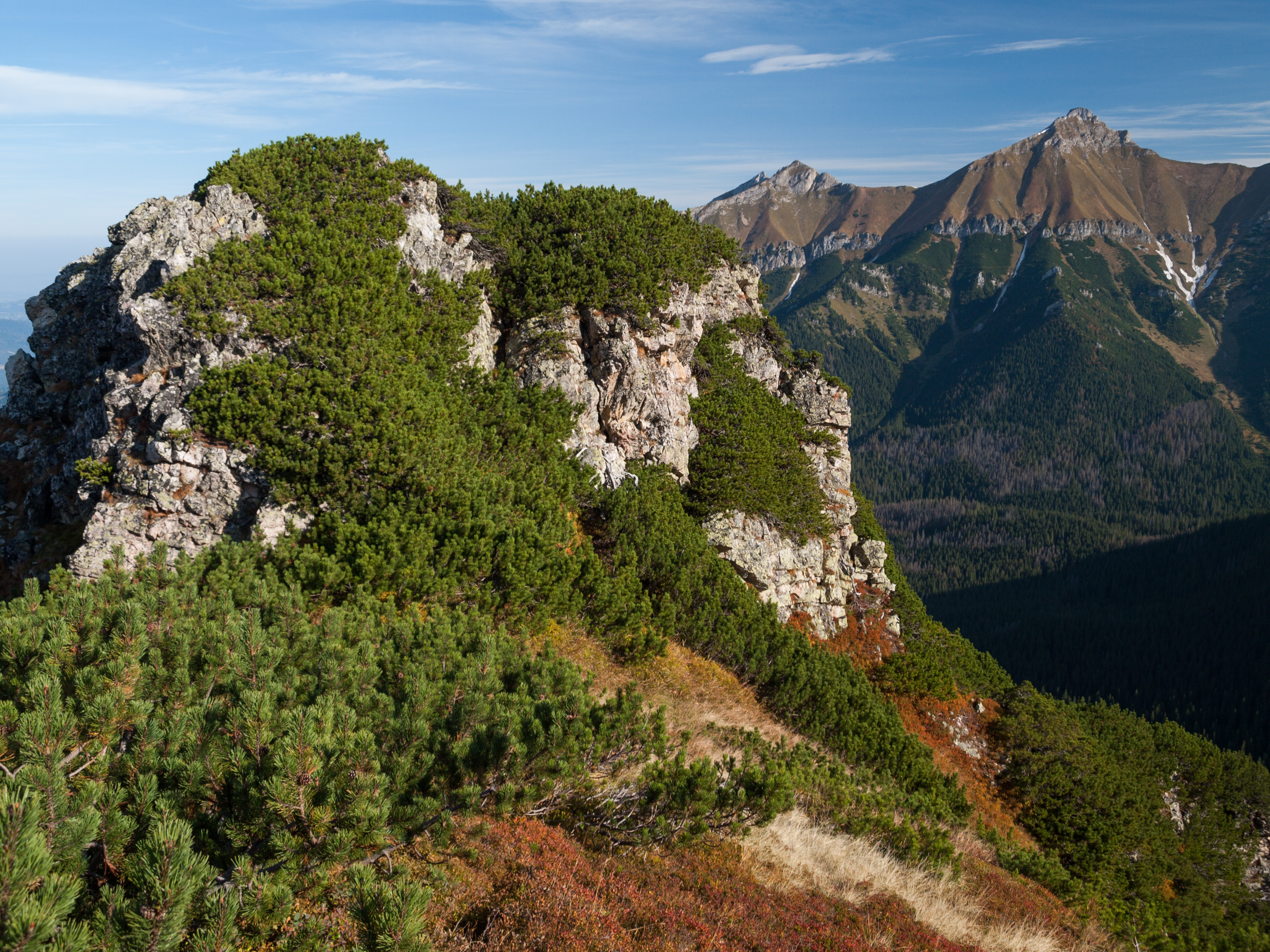 Samojedna Skałka (na bliższym planie, po lewej), w tle Nowy Wierch i Hawrań w Tatrach Bielskich.